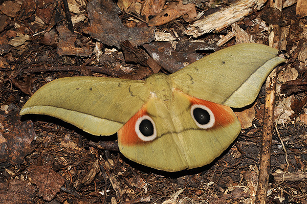 Lobobunaea acetes, Saturniidae